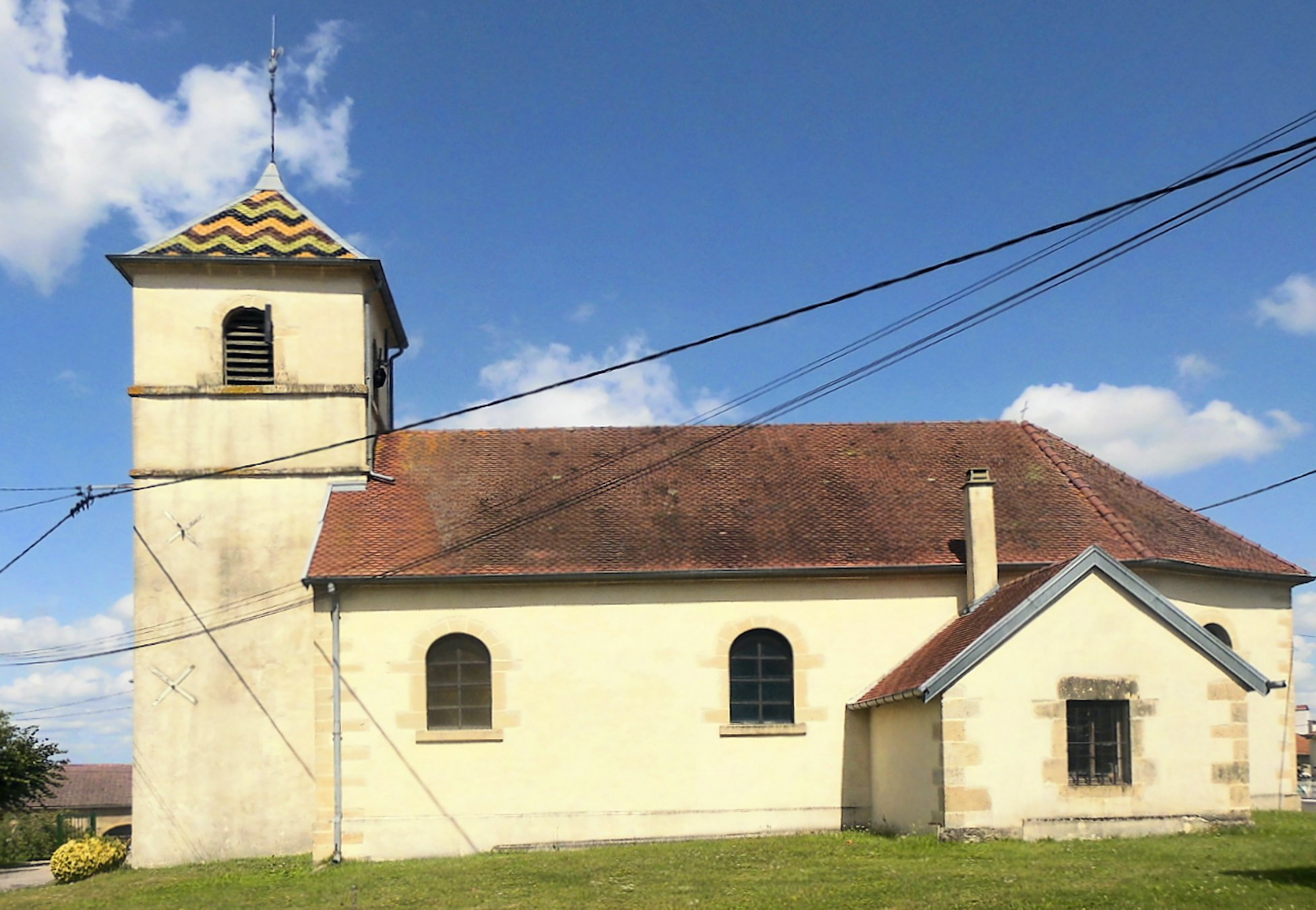 L'église Sainte-Suzanne de Saponcourt